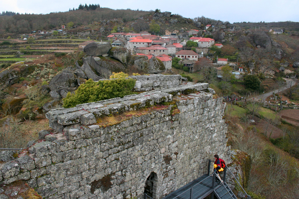 Castelo de Pena de Aguiar